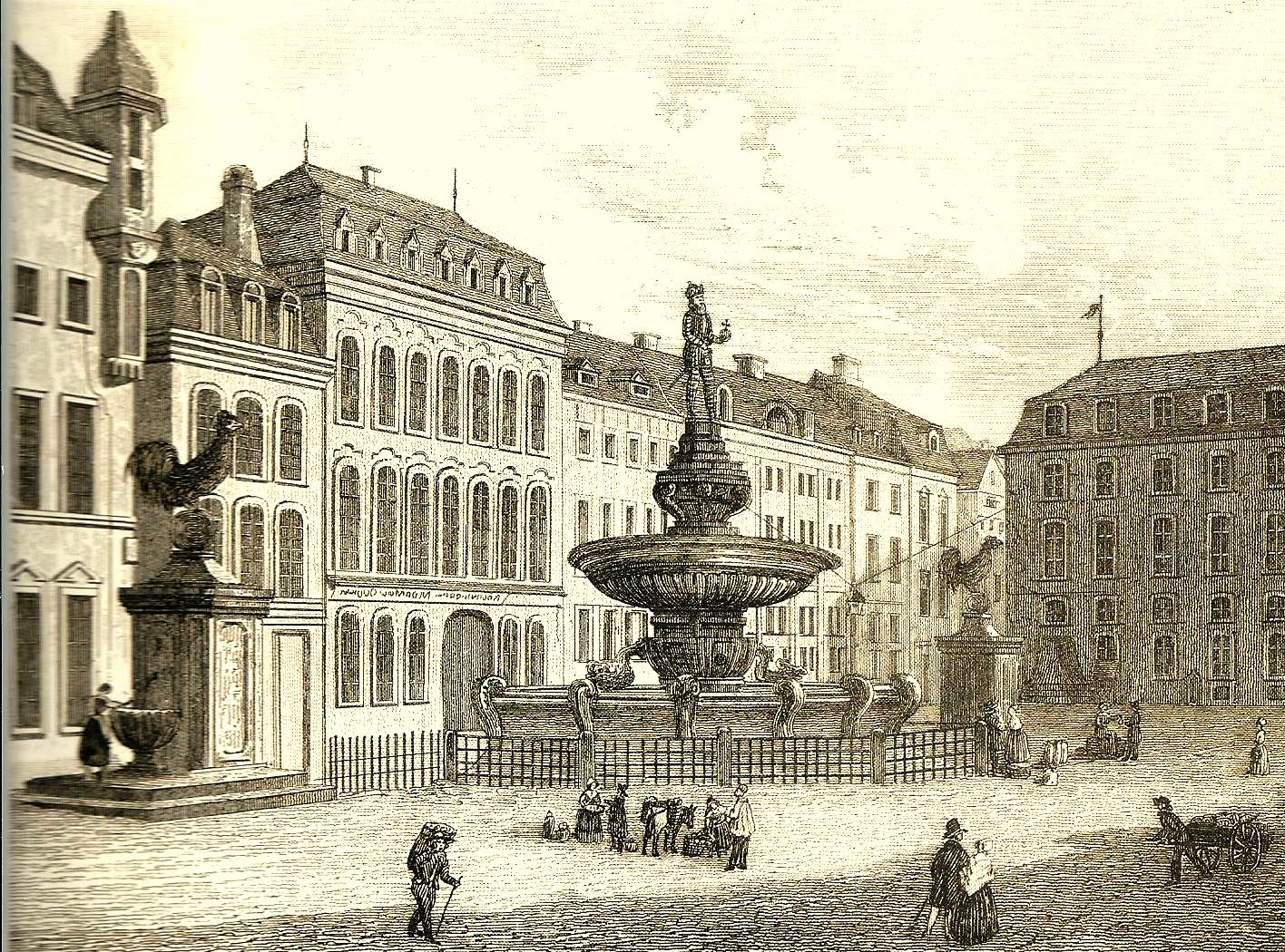 Grafik des Aachener Karlsbrunnen und den beiden vorgelagerten Trinkbrunnen